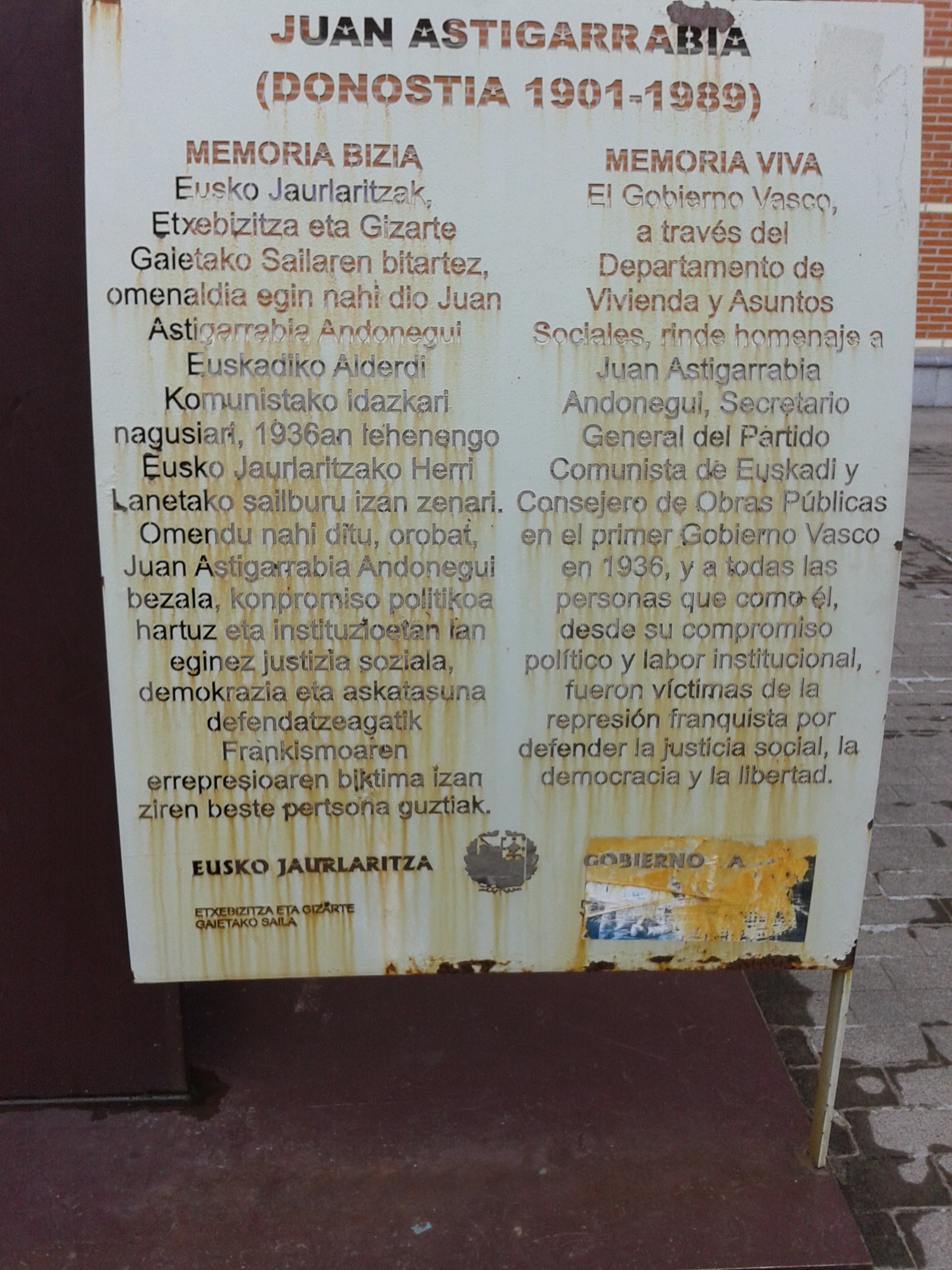 Placa conmemorativa dedicada a Juan de Astigarrabia en Donostia.